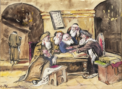 "В синагоге". Бумага, акварель, белила. 17,5 x 23,5 см